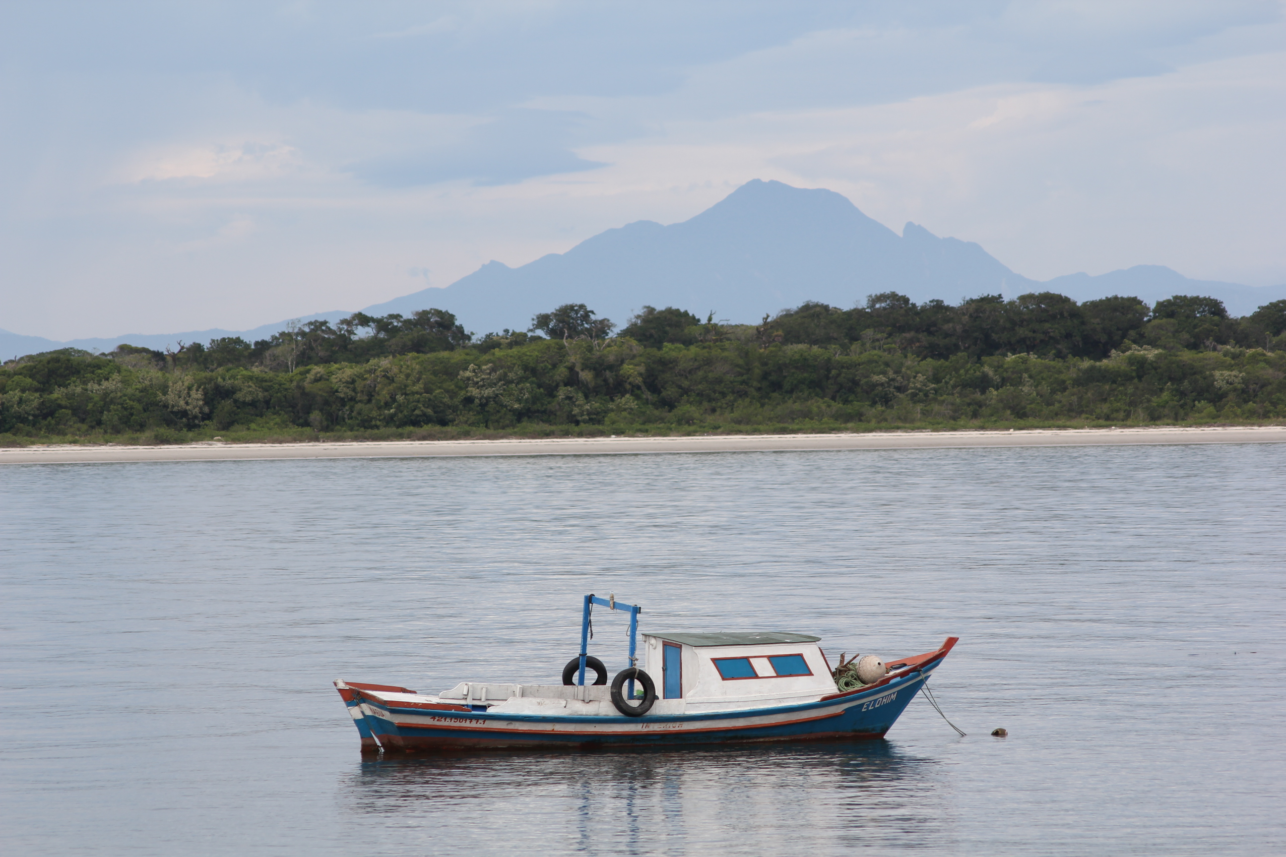 Tranquila e encantadora.